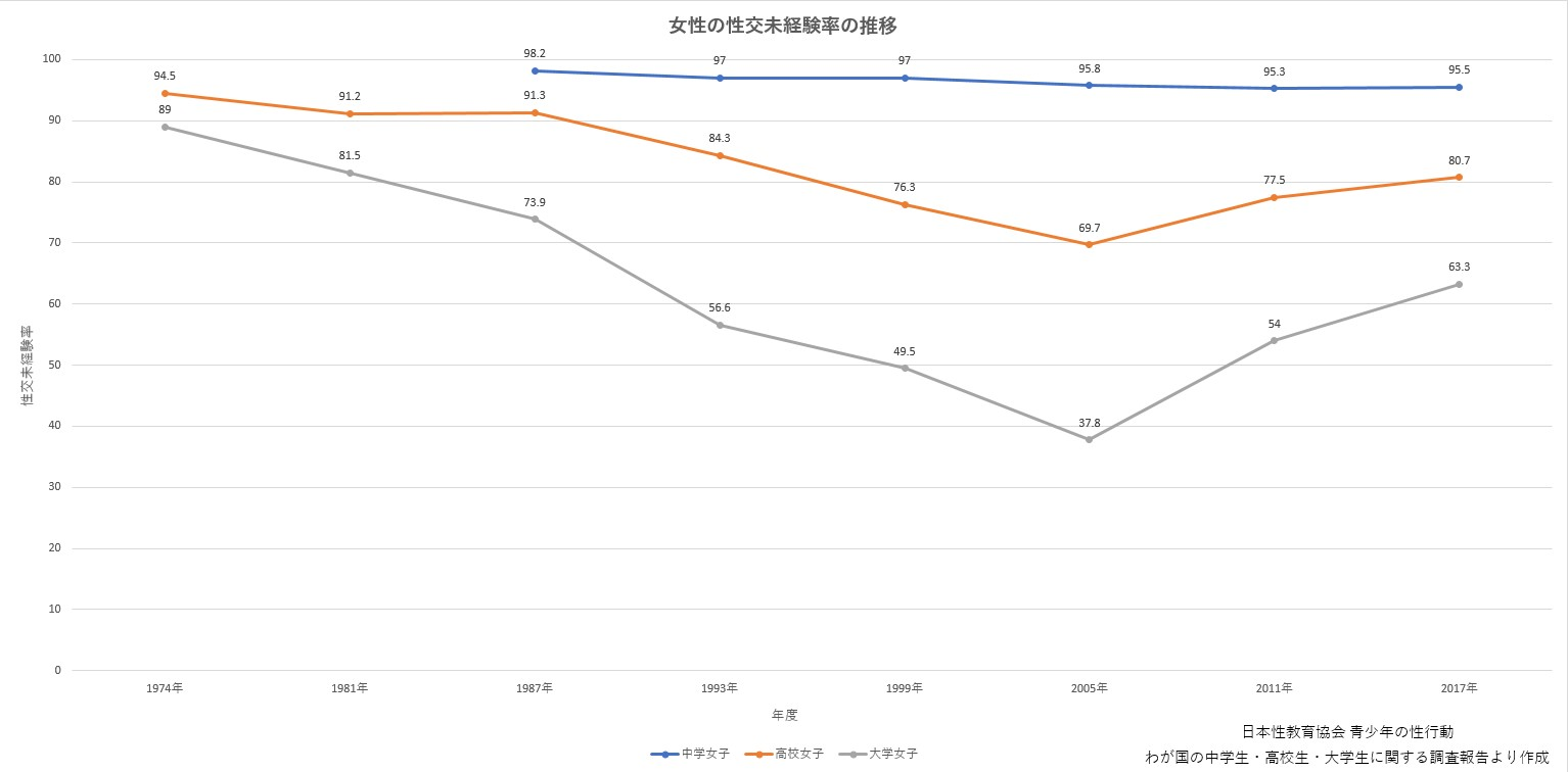 日本性教育協会の青少年の性行動 わが国の中学生・高校生・大学生に関する調査報告より作成